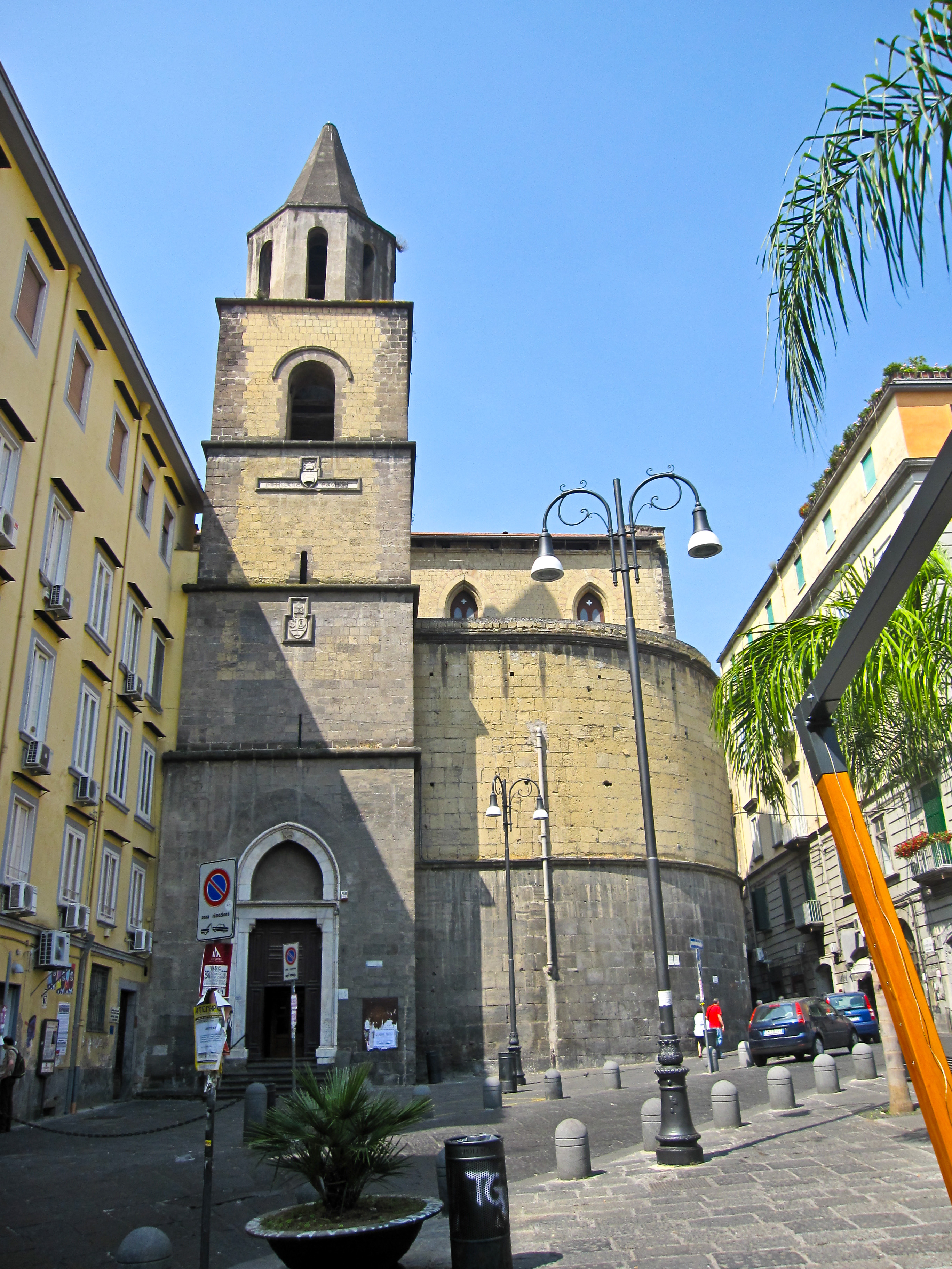 Chiesa di San Pietro a Majella - Napoli.